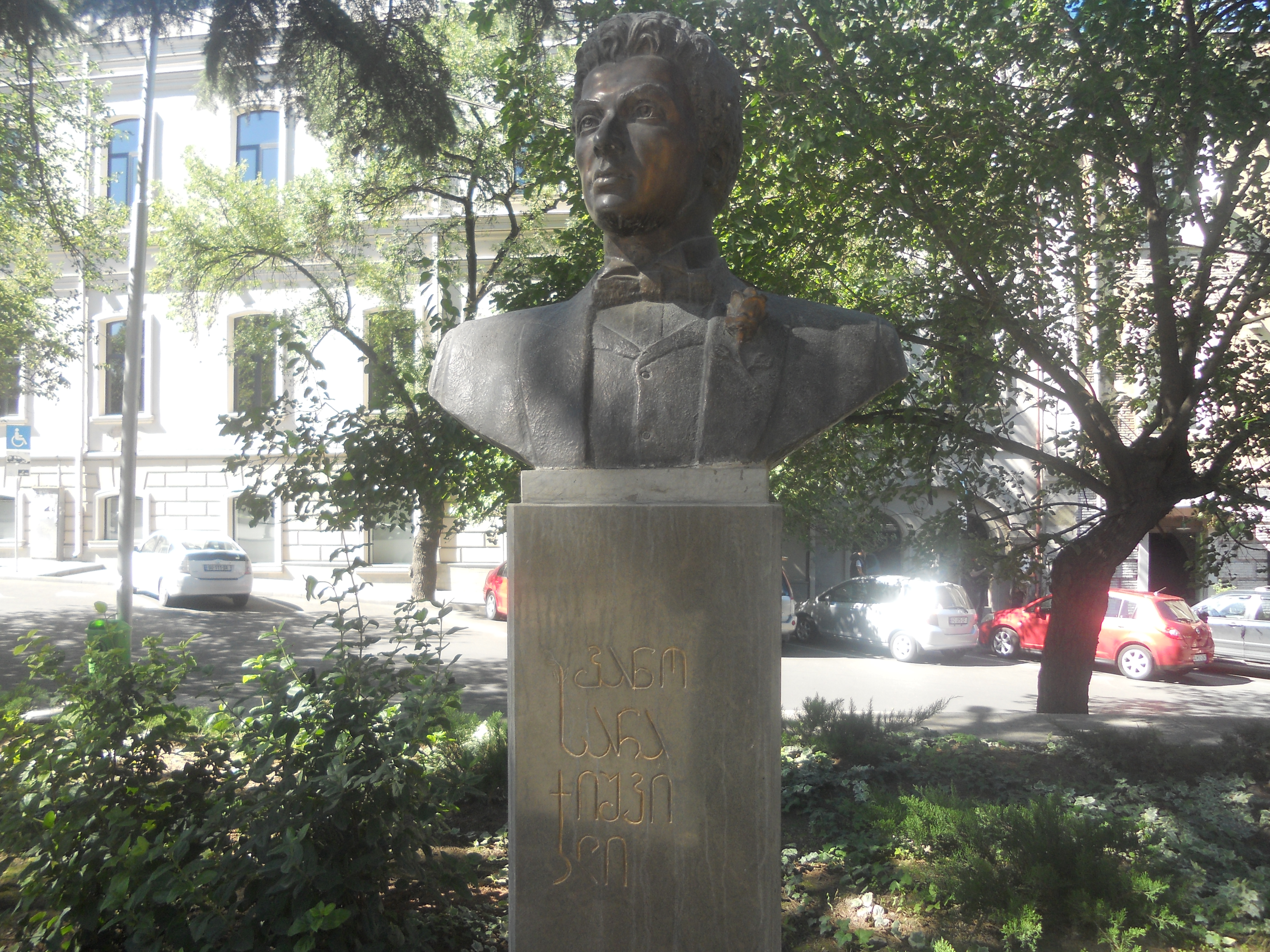 ზაქარია ფალიაშვილის სახელობის სახელმწიფო ოპერისა და ბალეტის თეატრი